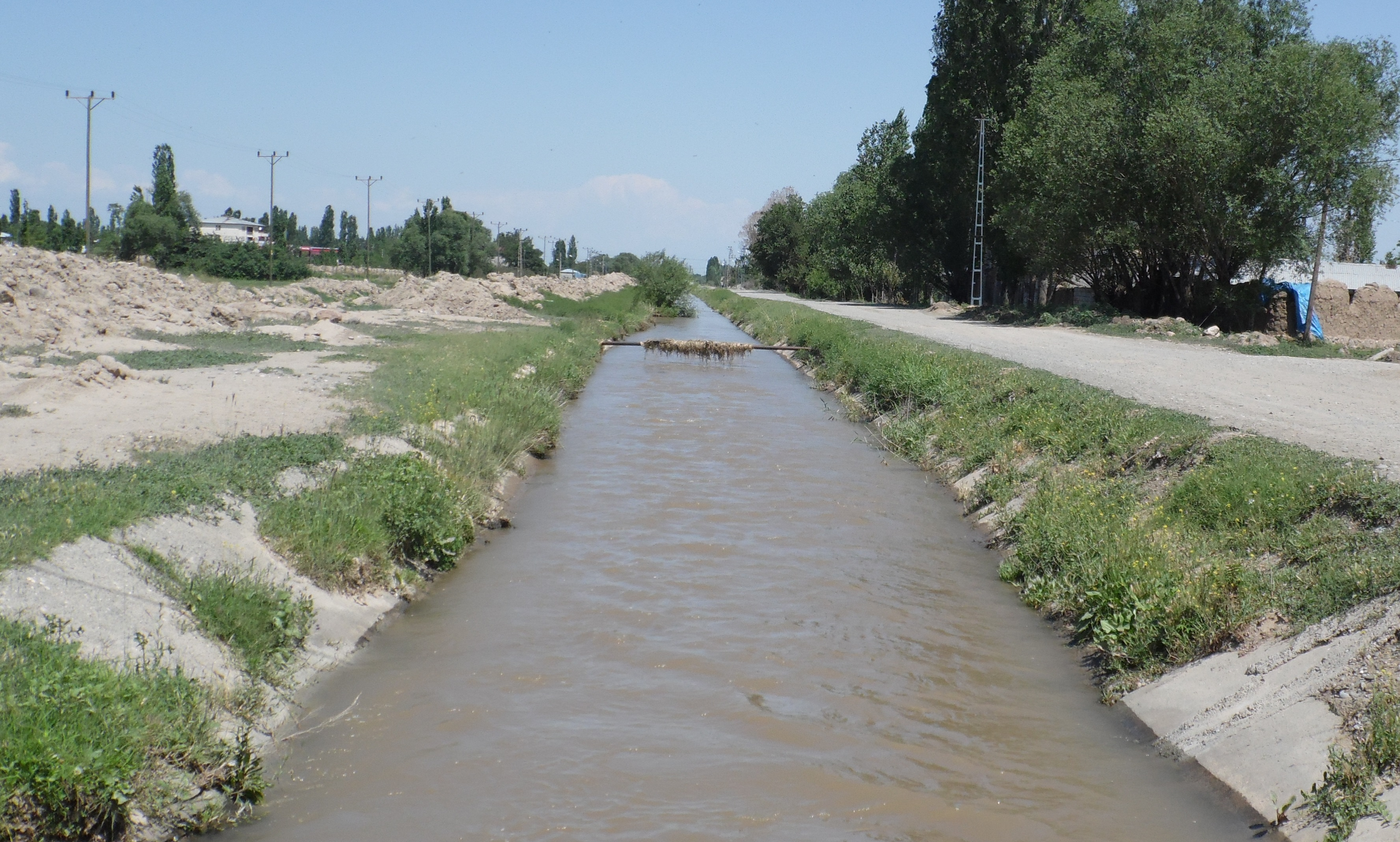 yaycı kanalı